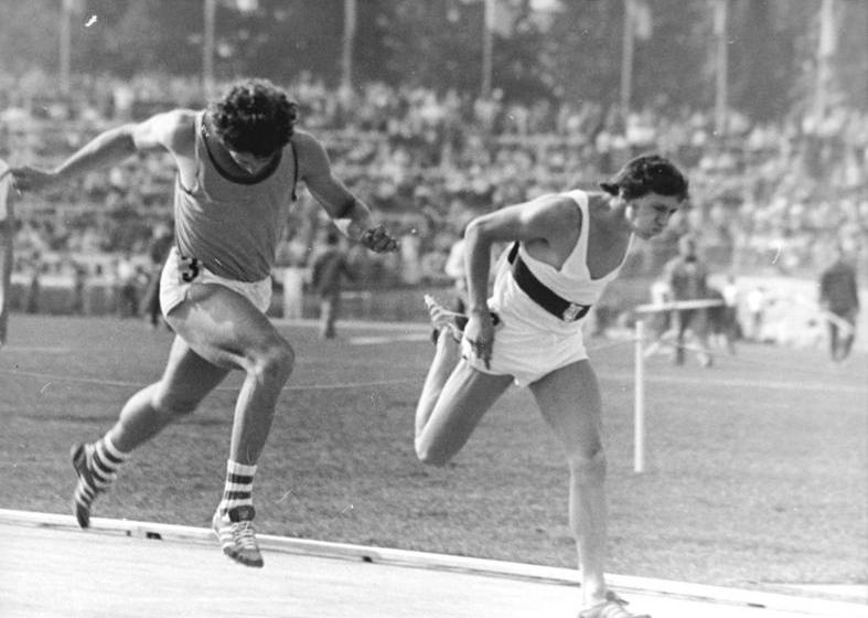 Bernhard Hoff, Detlef Kübek ADN-ZB Kluge 3.7.77 Dresden: DDR-Leichtathletik-Meisterschaften-3.Tag- Völlig überraschend erkämpfte sich der 18jährige Bernhard Hoff (SC Chemie Halle,r.) mit 20,93 s den DDR-Meistertitel über 200 m vor dem Favoriten Detlef Kübek (l. SC Traktor Schwerin) , der diese Distanz in 20,94 s lief.